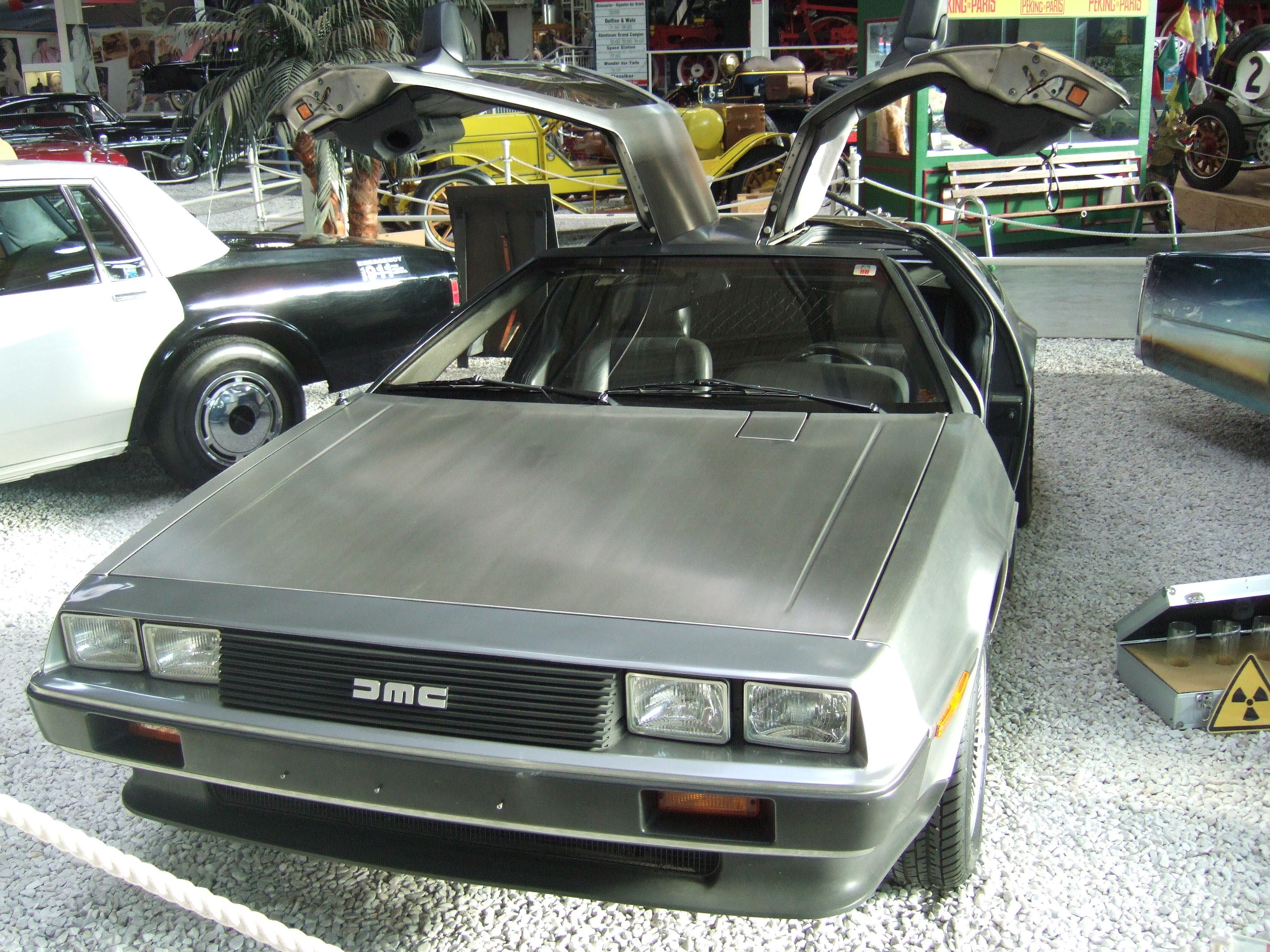 DeLorean